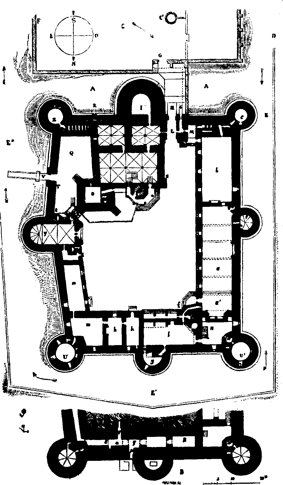 Dessin extrait de l'ouvrage Description du château de Pierrefonds, Paris : Bance, 1857, par Eugène Viollet-le-Duc.